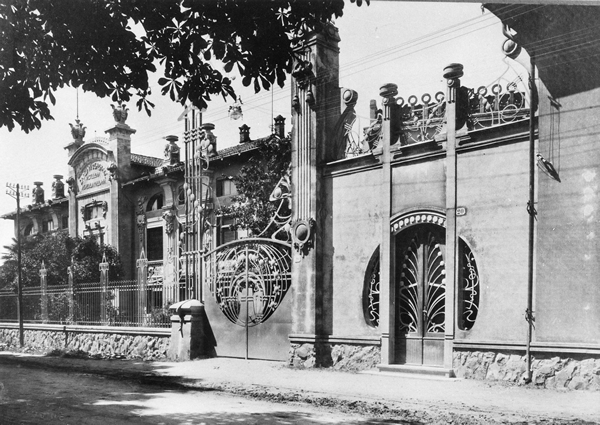 Silvio Piccini (1877-1955), Distilleria Canciani e Cremese (1905)